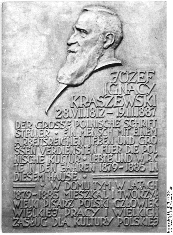 Dresden, Kraszewski - Gedenktafel Zentralbild Löwe 28.11.1960 Dresden ehrt den polnischen Schriftsteller Kraszewski - Gedankstätte feierlich eingeweiht in einer Feierstunde wurde am 27.11.1960 in Dresden in Gegenwart des Botschafters der Volksrepublik Polen, Pietrowski, sowie zahlreicher Schriftsteller und Literaturwissenschaftler Polens eine Gedenkstätte für den polnischen Schriftsteller Ignacy Jozef Kraszewski eingeweiht. UBz: Die Gedenktafel am Hause.